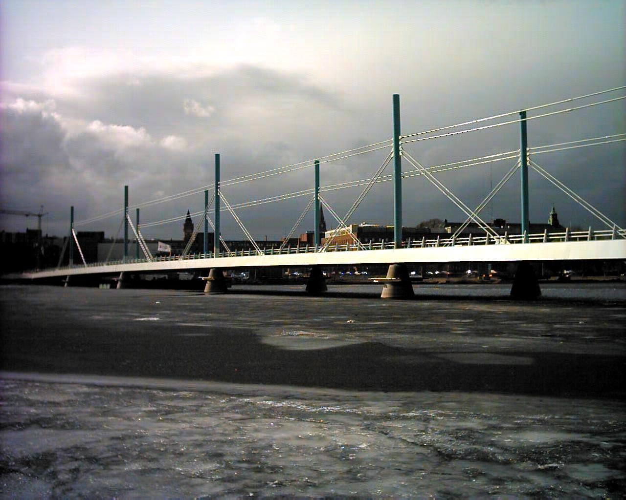 Centrala Jönköping. Munksjöbron. Photo taken by User:Boivie in Jönköping 7 April 2006